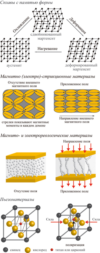 Примеры «умных» материалов. Цитируется из материалов лекций по нанотехнологиям, ФНМ МГУ, 2009 // Beispiele für "intelligente" Materialien // Examples of "smart" materials